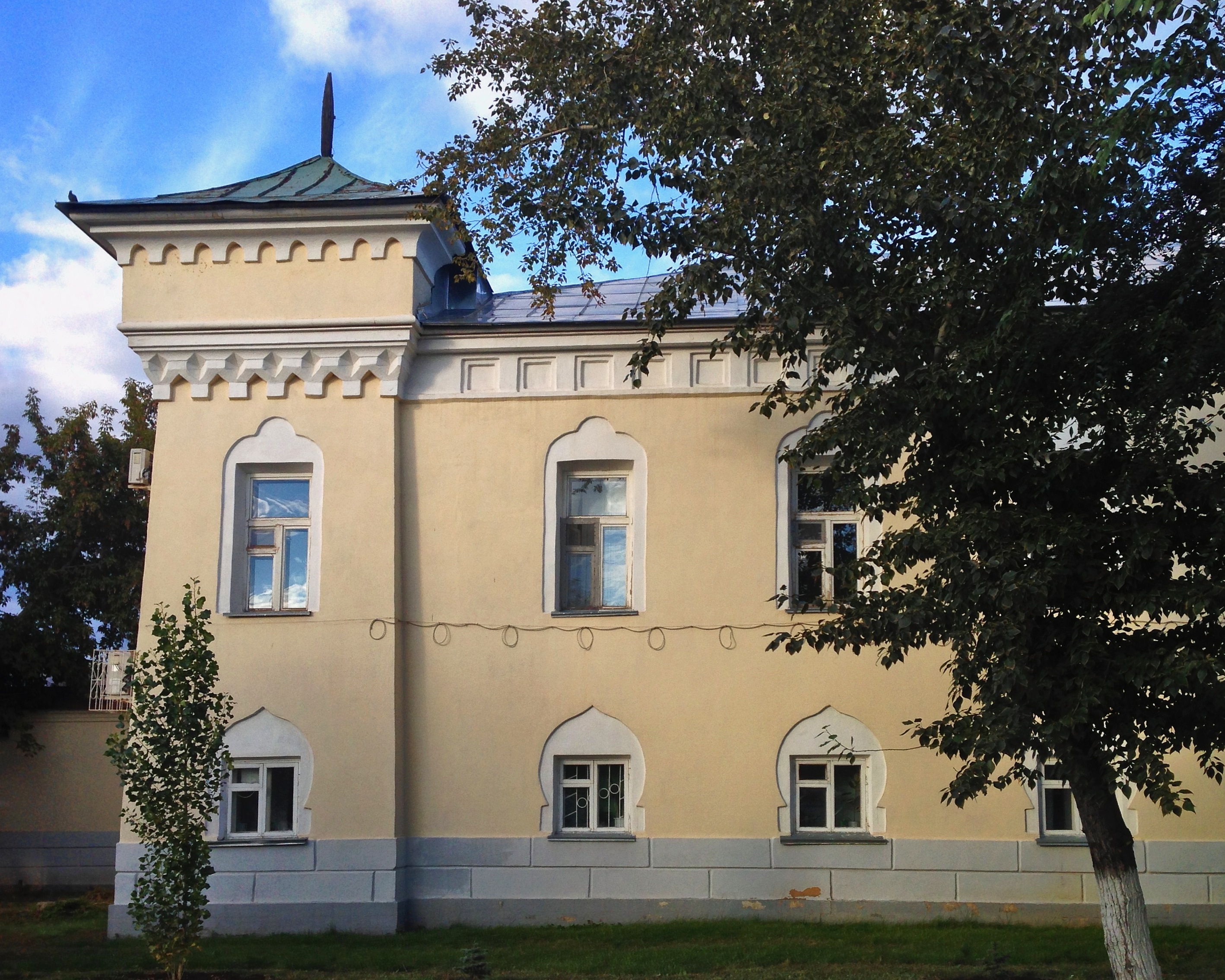 Постоялый двор (основной корпус) (Оренбургская область, Оренбург, Парковый пр., 6)